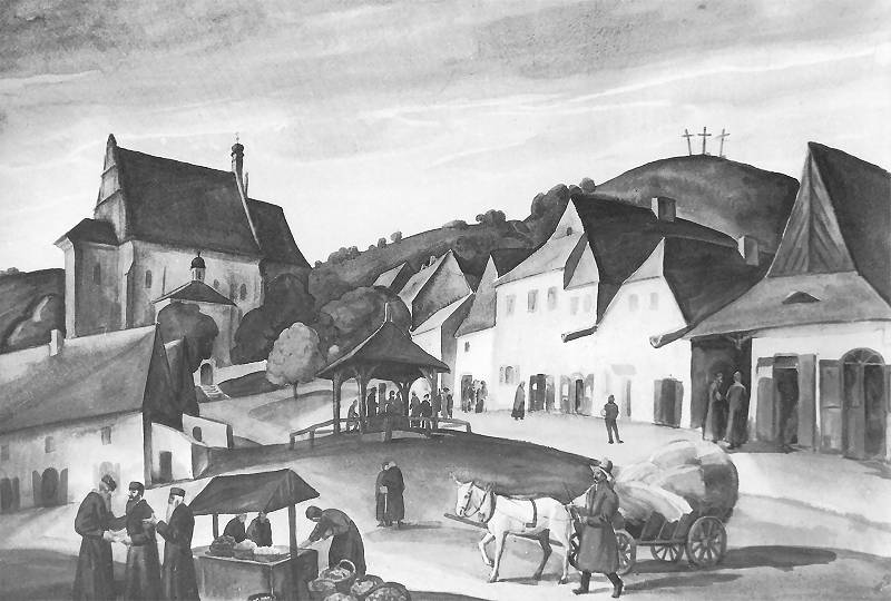 Marketplace in Kazimierz, National Museum in Warsaw